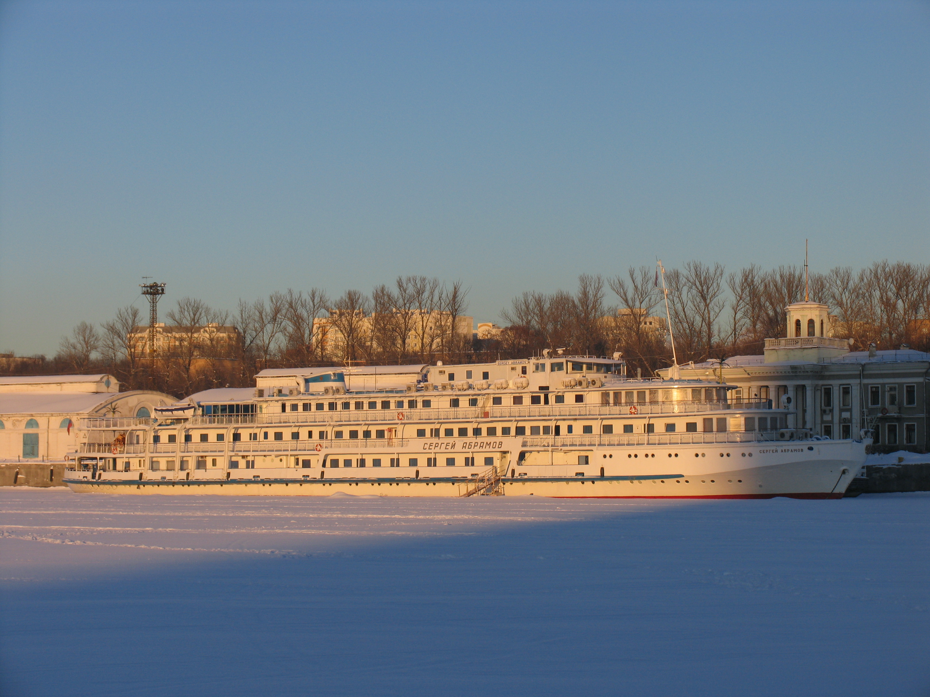 Теплоход "Сергей Абрамов"